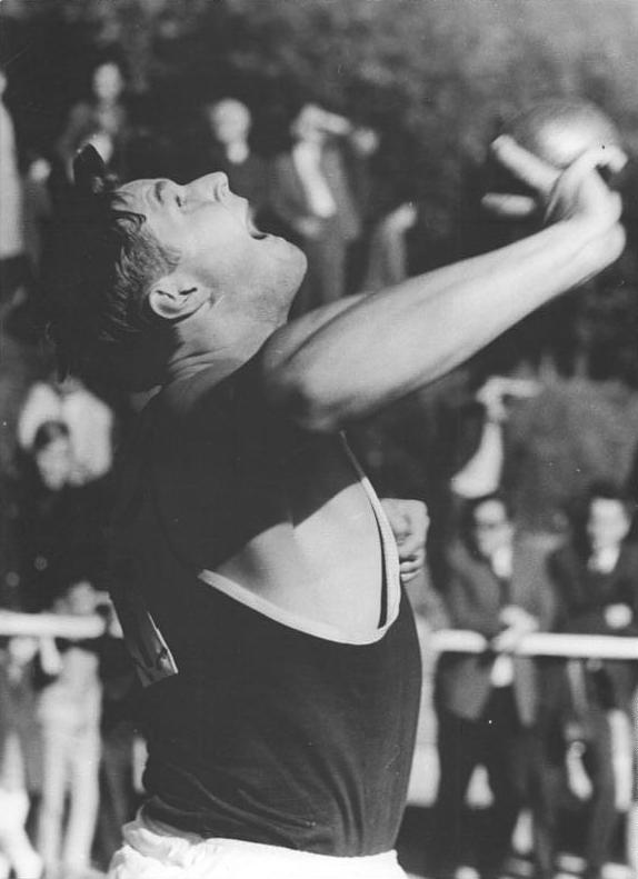 Hartmut Briesenick Zentralbild Demme 13.06.1970 Karl-Marx-Stadt: Leichtathletik-Studentenmeisterschaften der DDR-Die beste Leistung des zweiten Wettkampftages erreichte Hartmut Briesenick (DHfK,Foto von den letzten DDR-Meisterschaften) mit 20,39 Meter im Kugelstoßen und erzielte damit eine neue persönliche Bestweite.